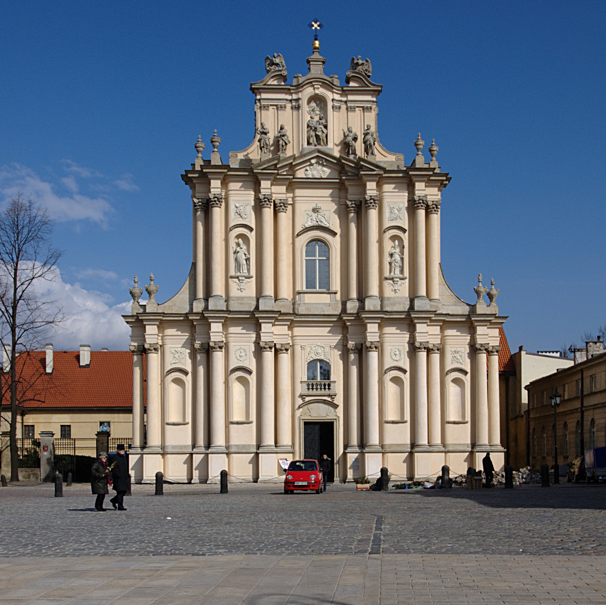 Kościół Sióstr Wizytek pw. Opieki św. Józefa Oblubieńca.